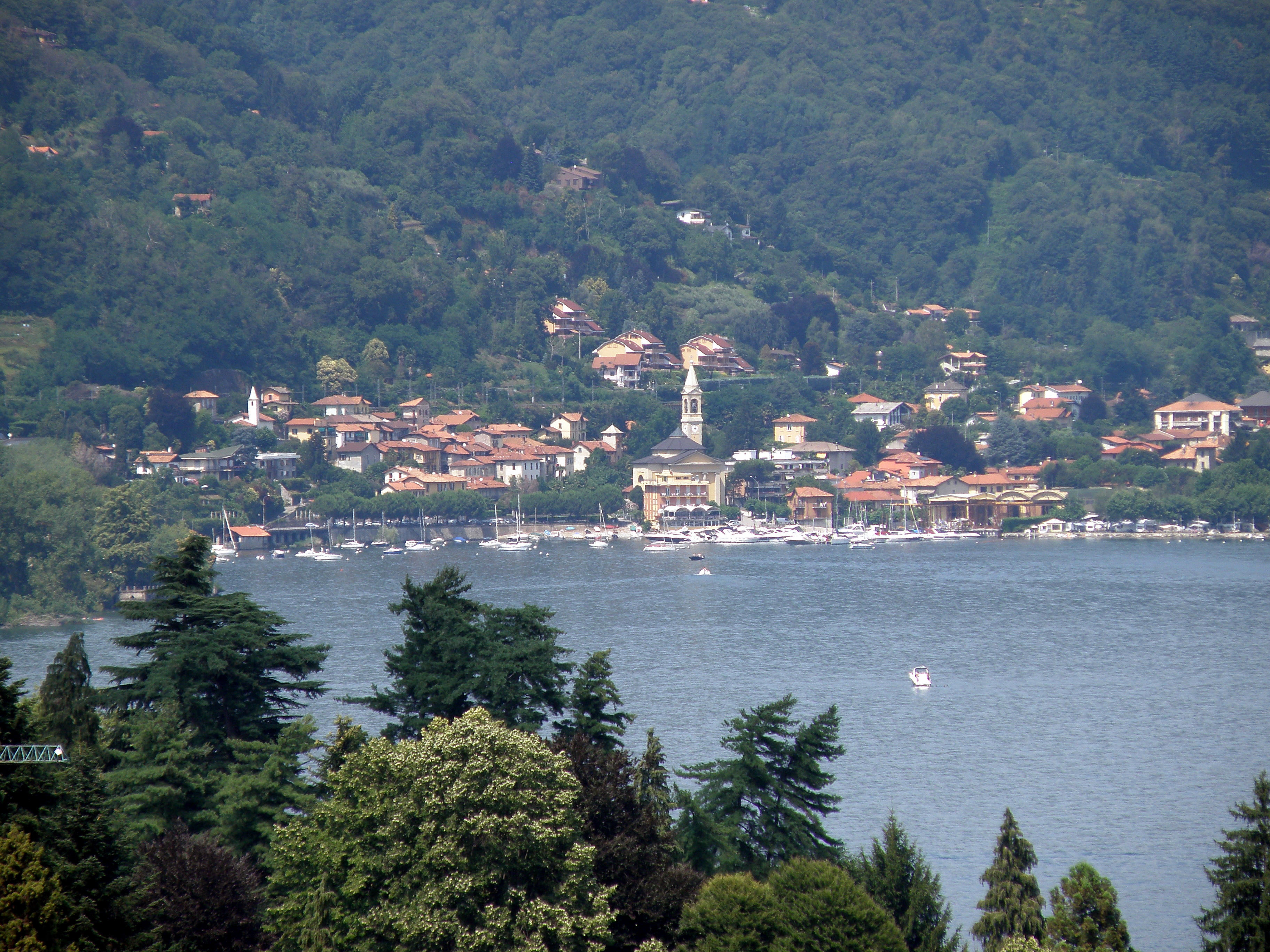 Solcio (fraz. del comune di Lesa). Vista da Meina (guardiamo verso nord).